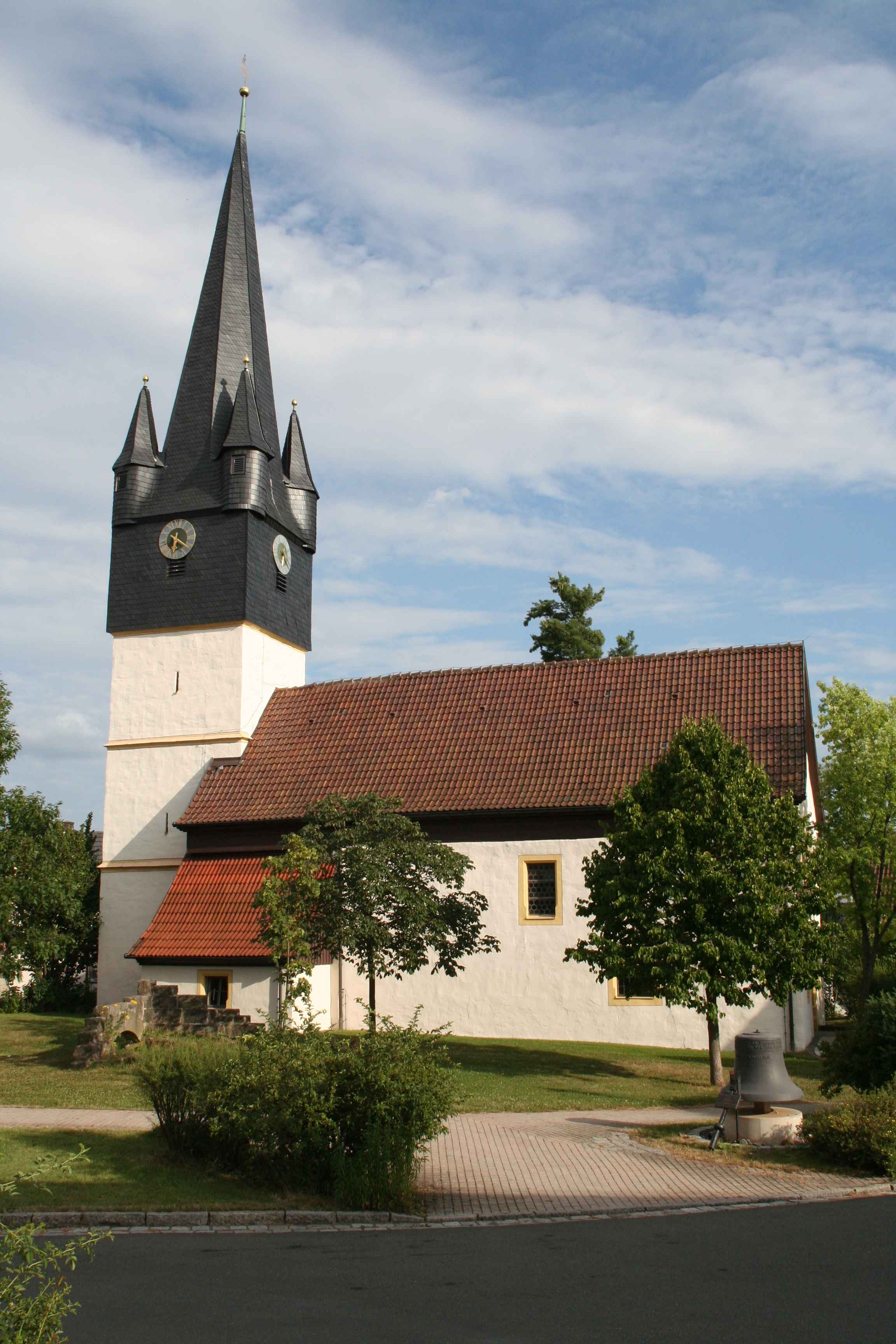 ev. Kirche Grub am Forst evangelische Stadtkirche in Grub am Forst, Landkreis Coburg